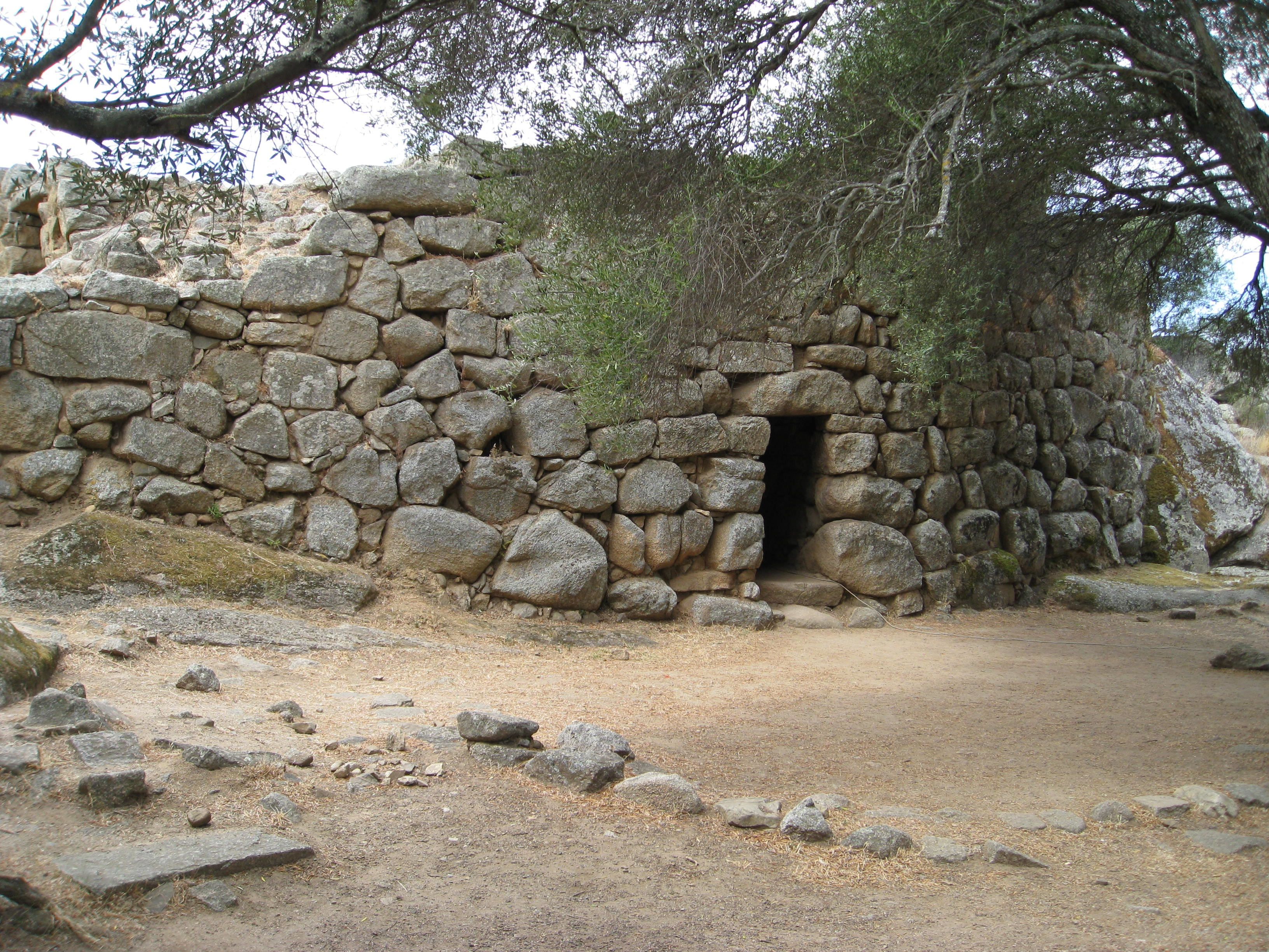 Arzachena, Sardegna, Italy